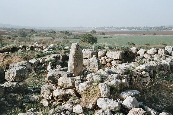 תל בטש, המזוהה עם תמנה הפלישתית